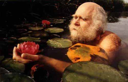 foto ter beschikking gesteld door de kunstenaar. Beschikbaar gesteld via zoon kunstenaar Gebruiker:Vincedevries.